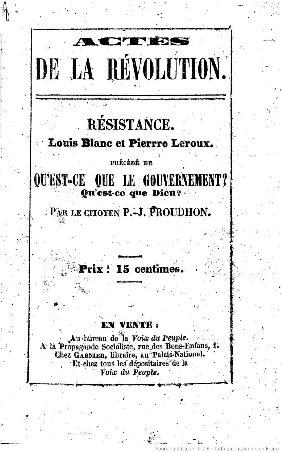 Pierre-Joseph Proudhon - Actes de la révolution : Résistance : Louis Blanc et Pierre Leroux, précédé de Qu'est-ce que le gouvernement ? qu'est-ce que Dieu ?, Paris, 1849.